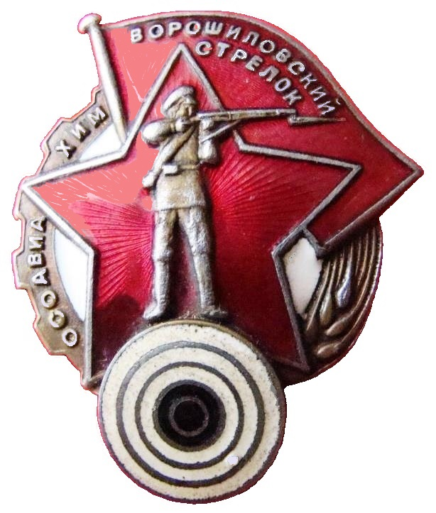 Нагрудный значок Осоавиахима и РККА "Ворошиловский стрелок"